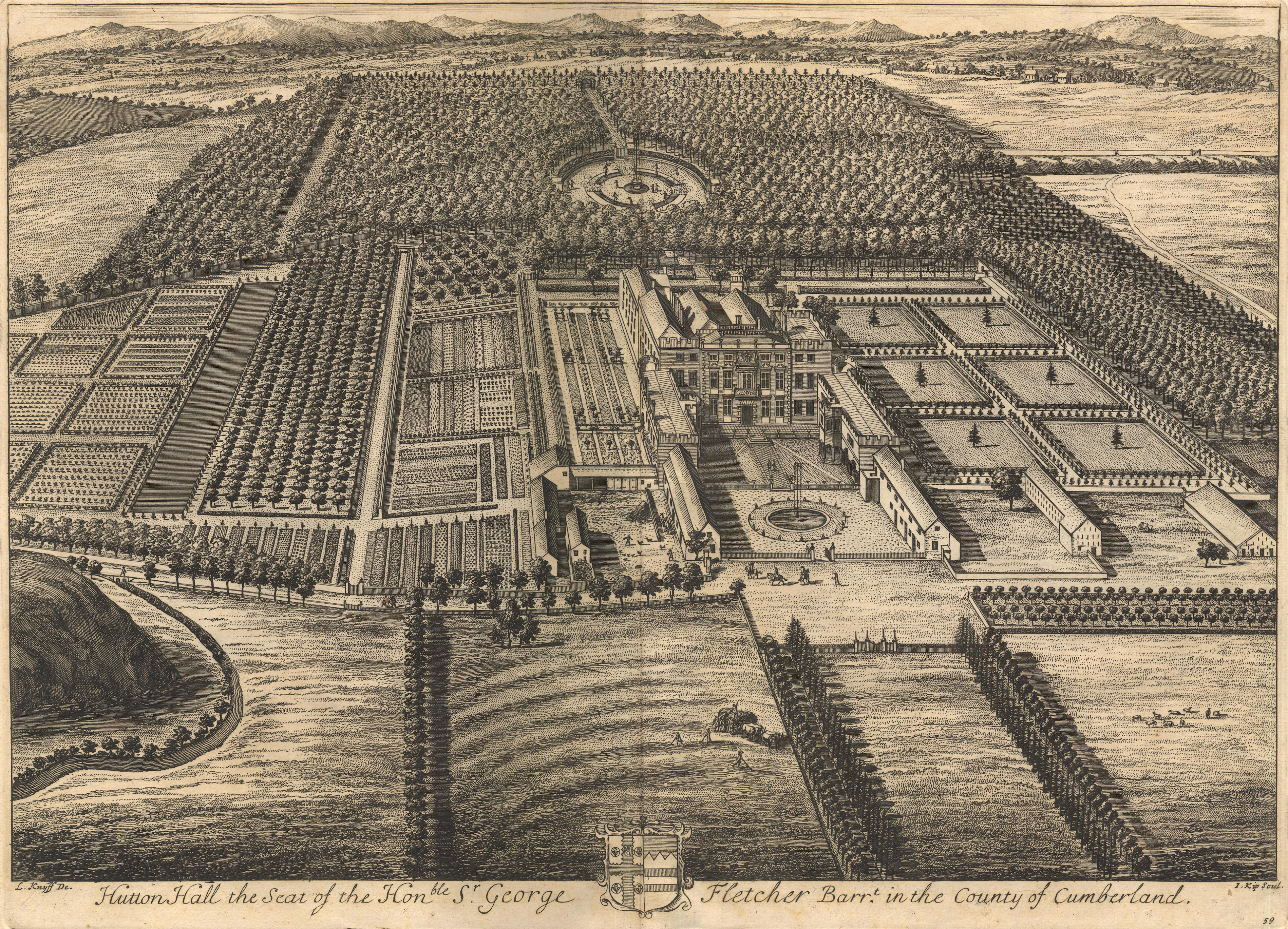 Darstellung von Hutton-in-the-Forest Hall auf einem alten Stich